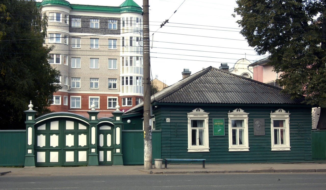 Дом-музей Салтыкова-Щедрина, г. Киров